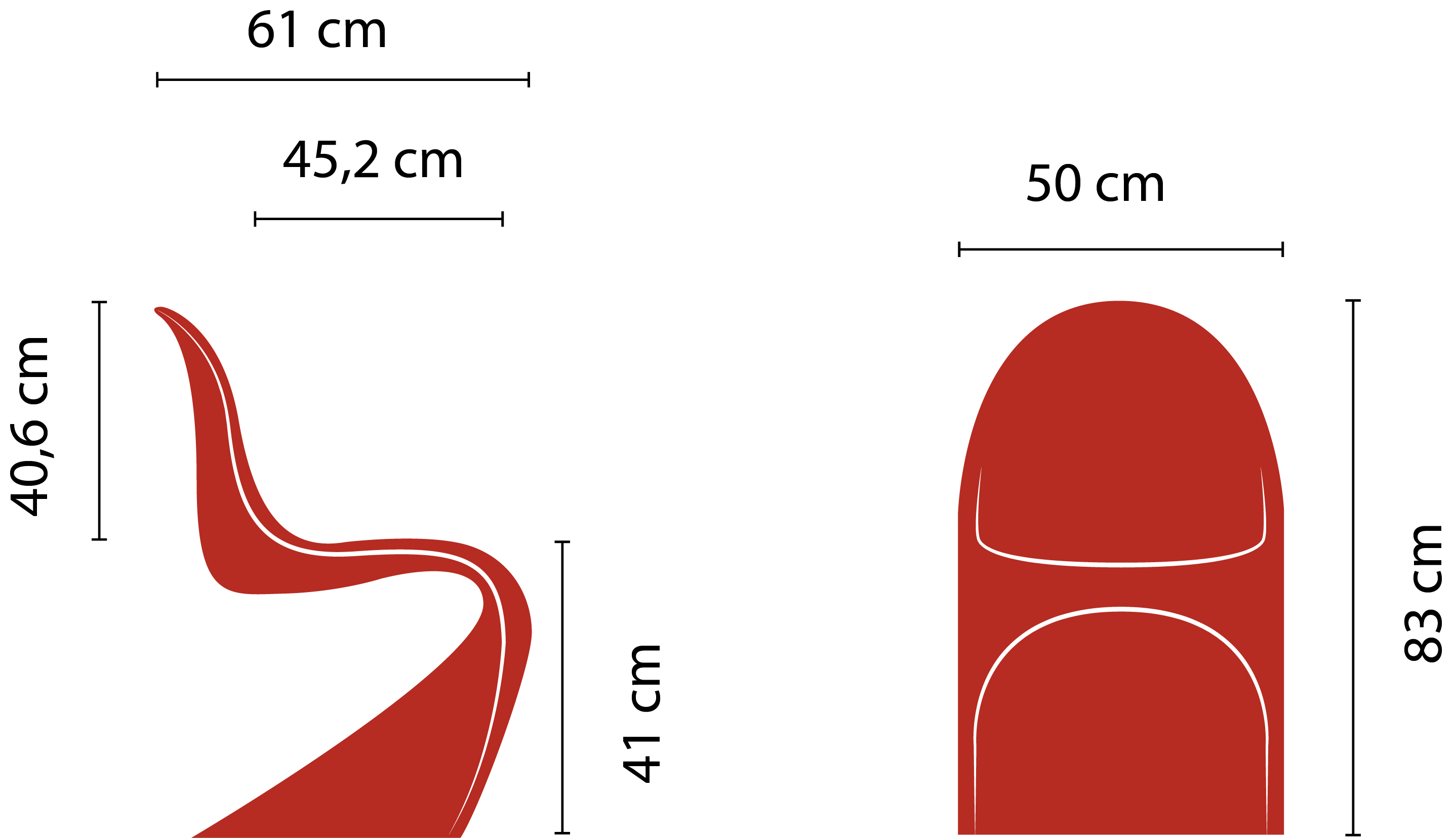 Sono le misure di massima che descrivono le volumetrie della sedia Panton